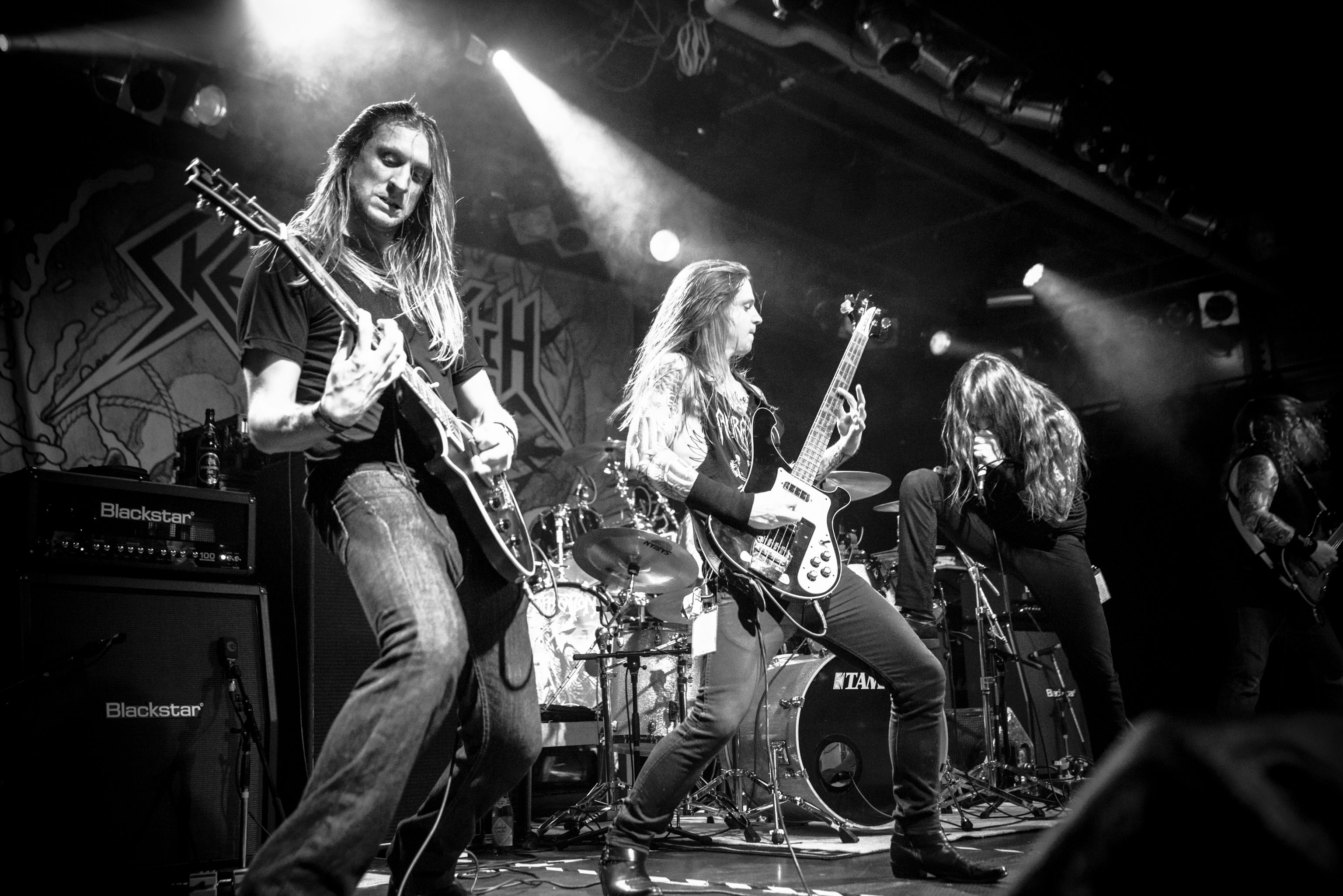 de